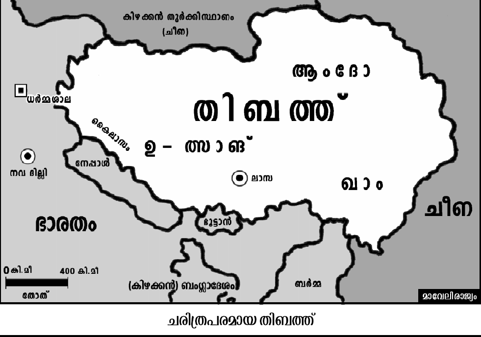 തിബെത്തു് ഭൂപടം